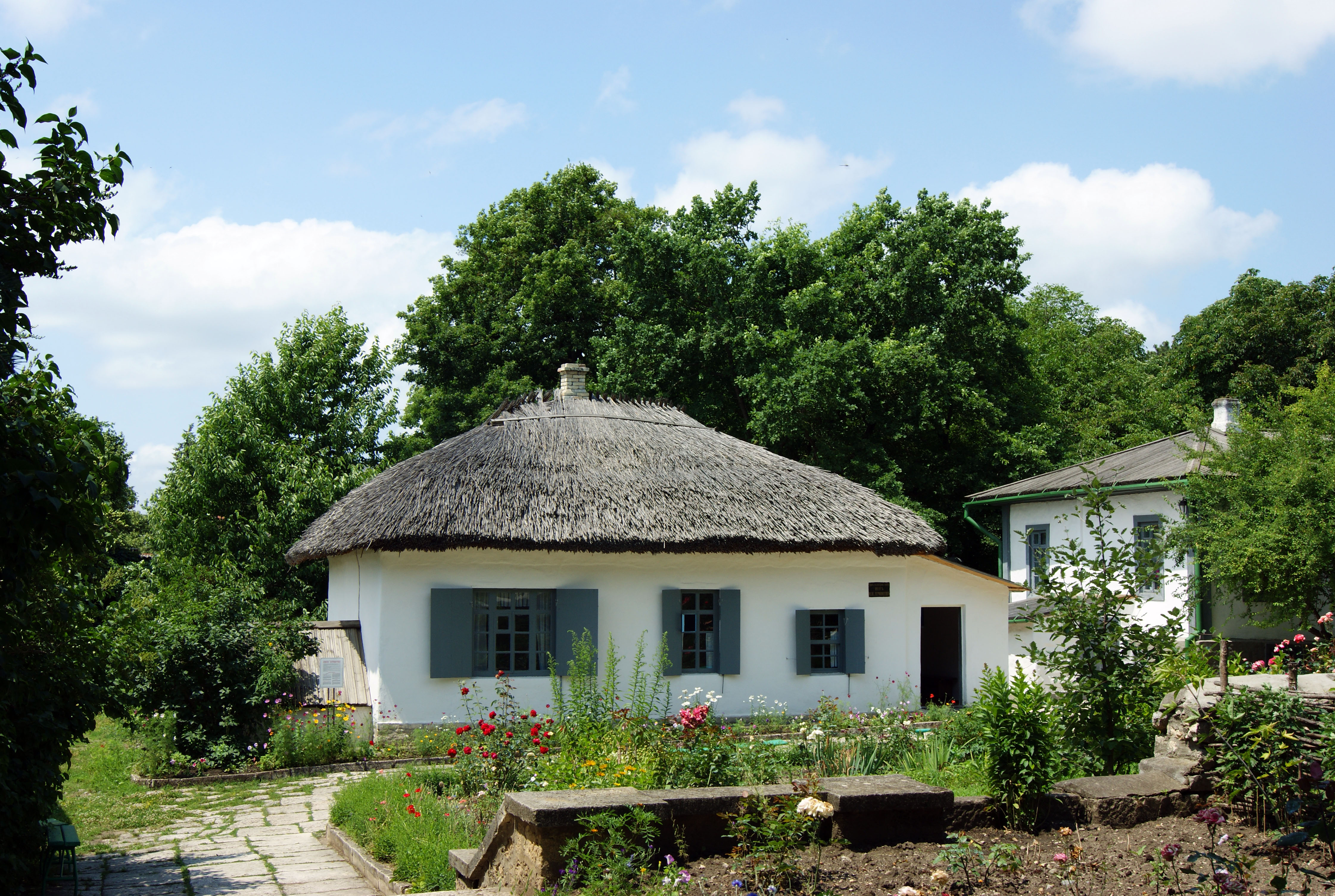 Музейный комплекс в Пятигорске